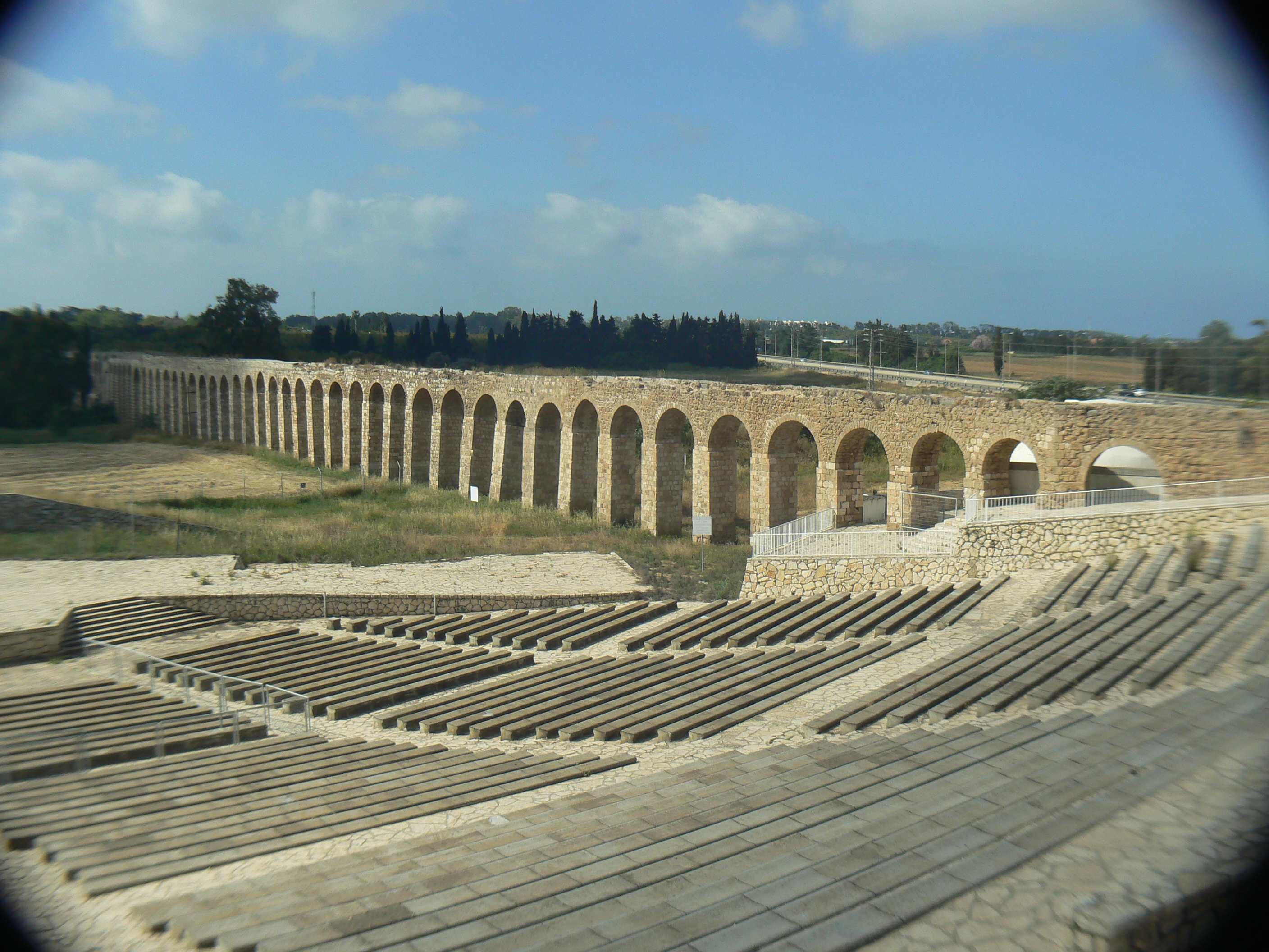 אמת סולימאן פחה ליד he:לוחמי הגטאות. האמה הובילה he:מים ממעינות ליד he:כברי לhe:עכו. נקראה על שם סולימאן בנו של he:אחמד אל-ג'זאר שליט עכו.